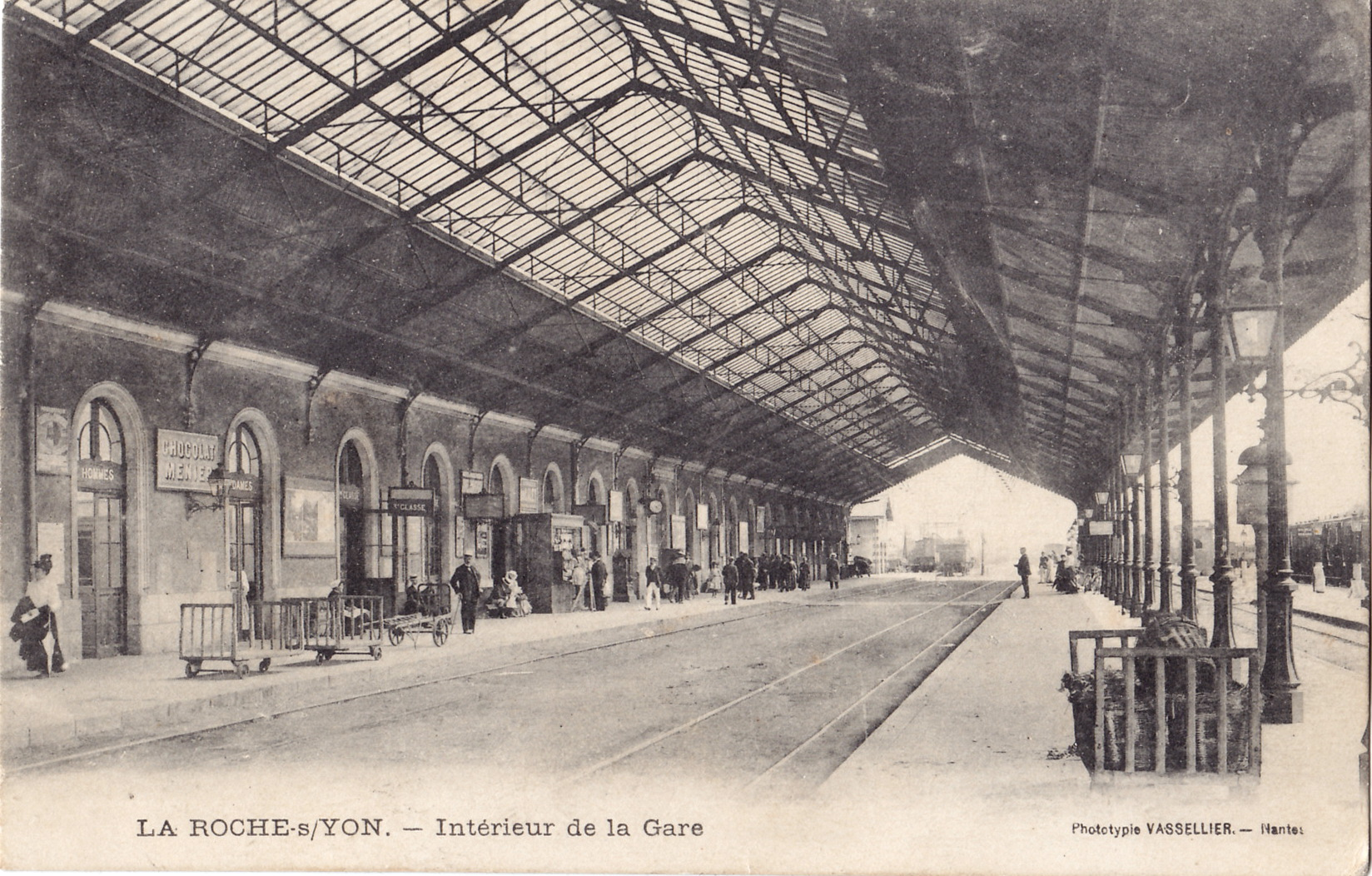 Carte postale ancienne éditée par Phototypie Vasselier à Nantes : LA ROCHE-SUR-YON - La Gare